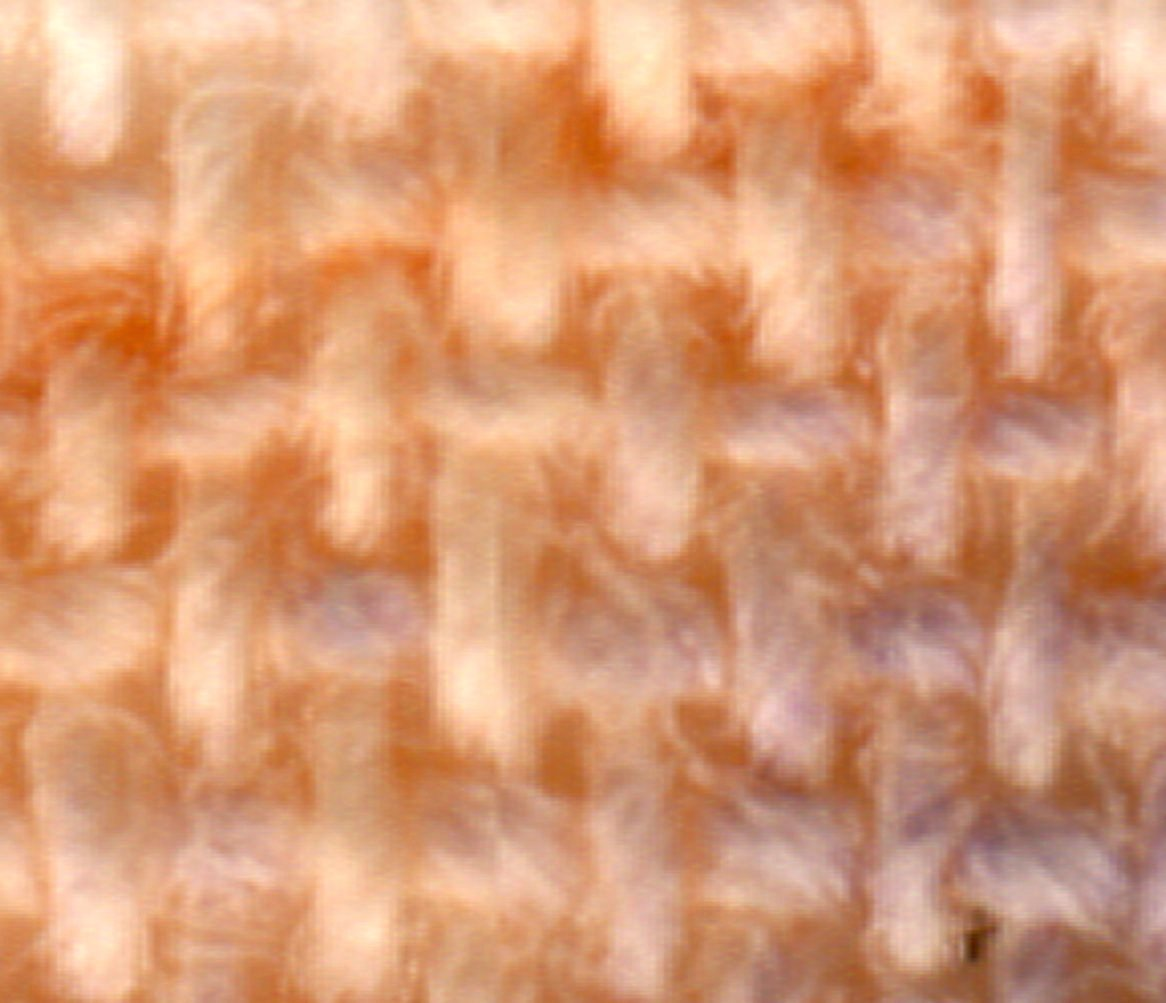 Изображение ткани, сделанное сканером